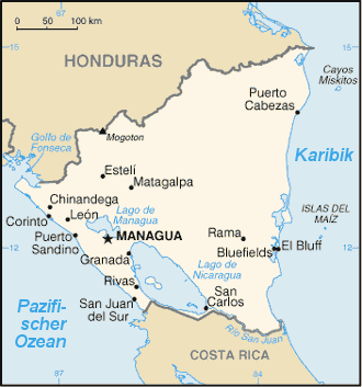 Karte von Nicaragua